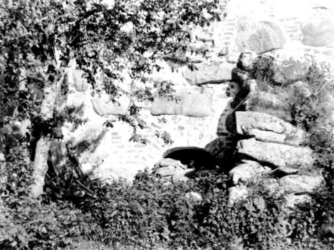 Соловецкий монастырь. Ворота с тайным ходом в Сушило.